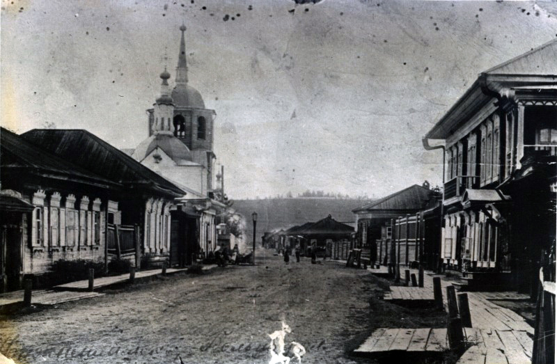 Село Нижнеилимск: справа (на переднем плане) дом купца Я. А. Черных, слева (у фонаря) его магазин, на заднем плане церковь Покрова Пресвятой Богородицы